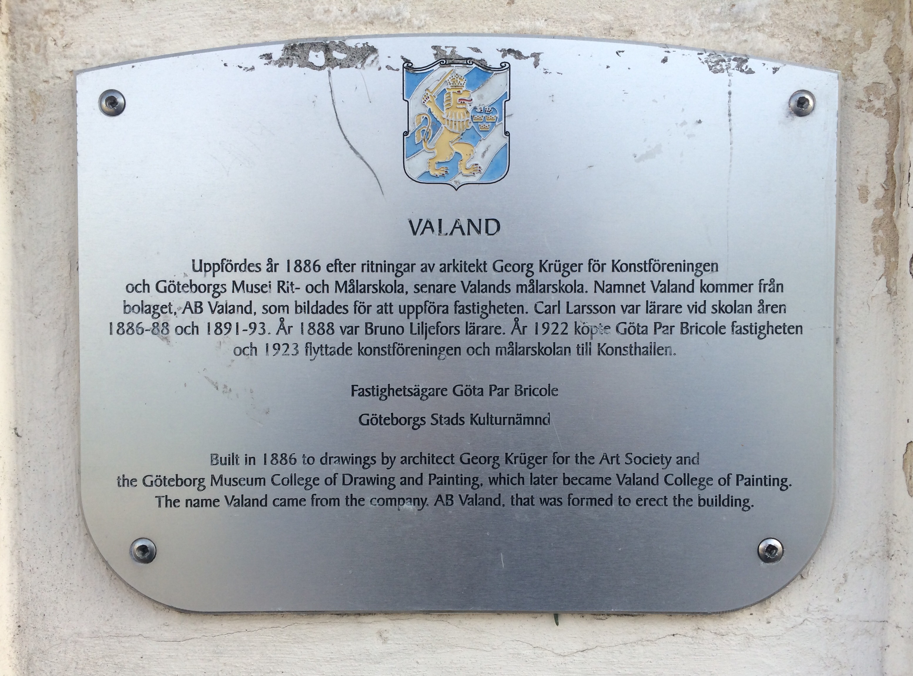 Plakett uppsatt på fasaden till Valandhuset vid Vasagatan 41 i Göteborg. Uppsatt som en del av Göteborgs stads kulturnämnds "Projekt Husmärkning" kring år 2000/2001 då drygt hundra skyltar sattes upp. Se även boken "100 utmärkta hus i Göteborg". Vid en inventering 2016 satt 69 skyltar fortfarande uppe.